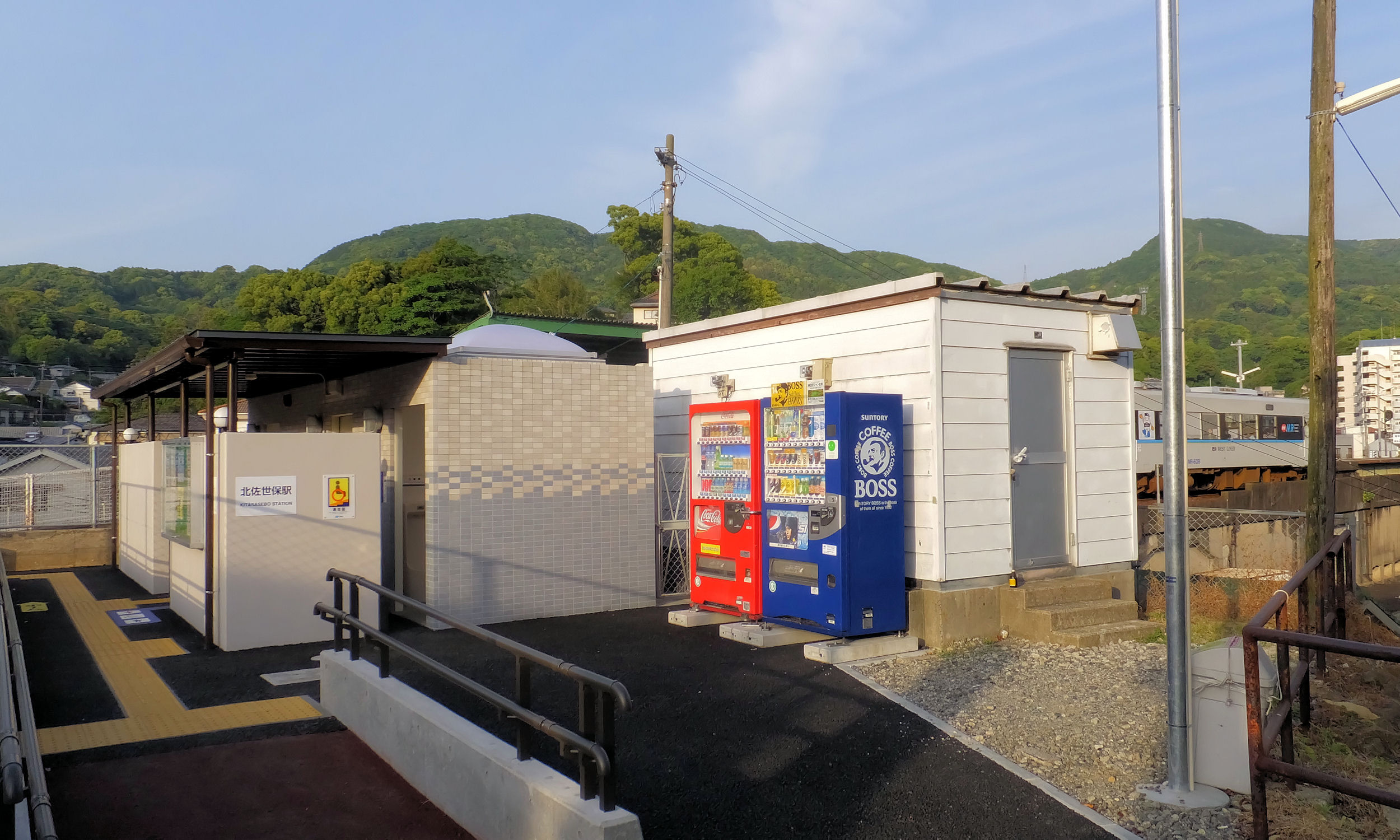 松浦鉄道北佐世保駅（トイレと信号建屋）